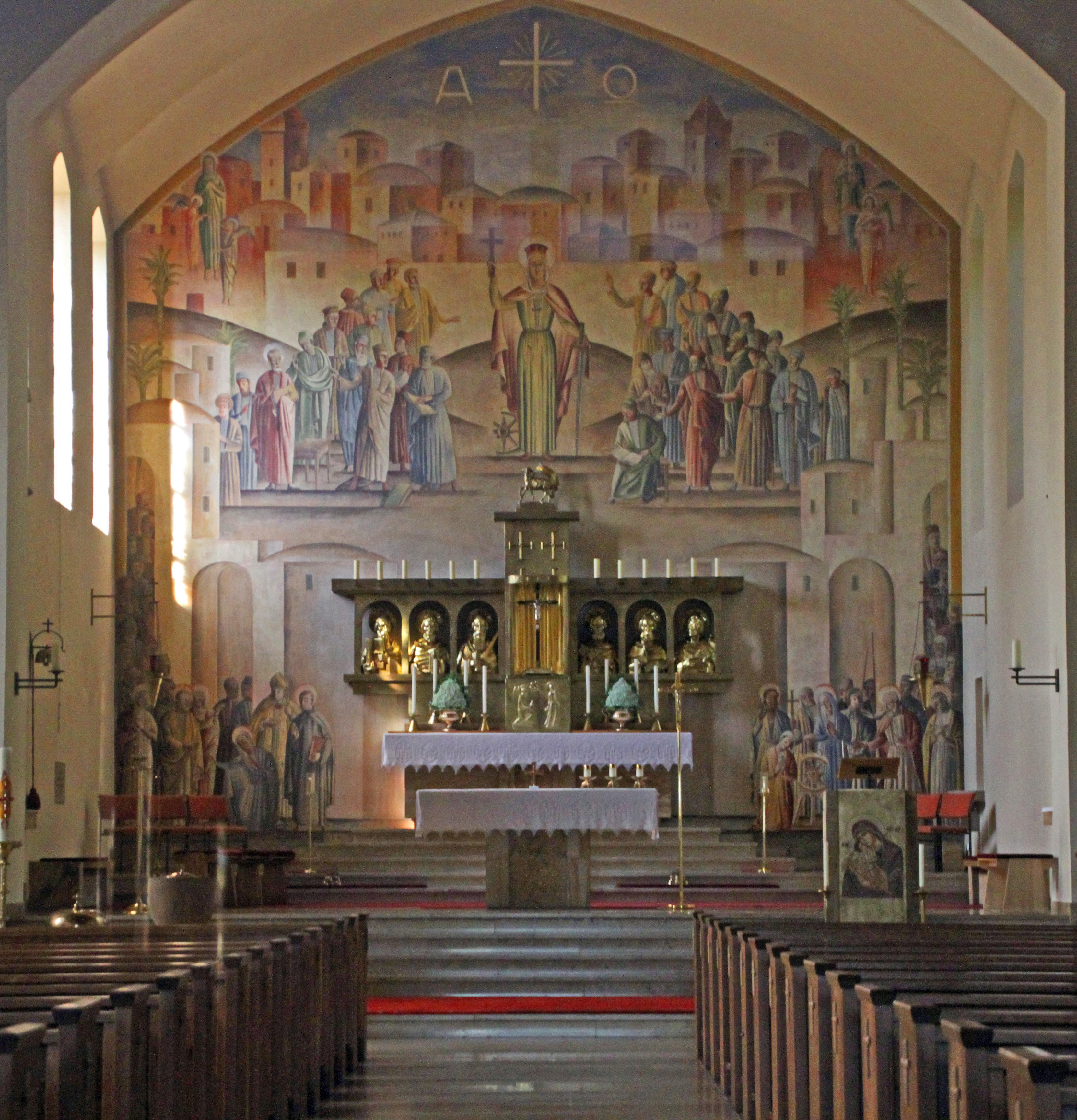 Leimen, Kirche St. Katharina, Chorausmalung von Paul Thalheimer